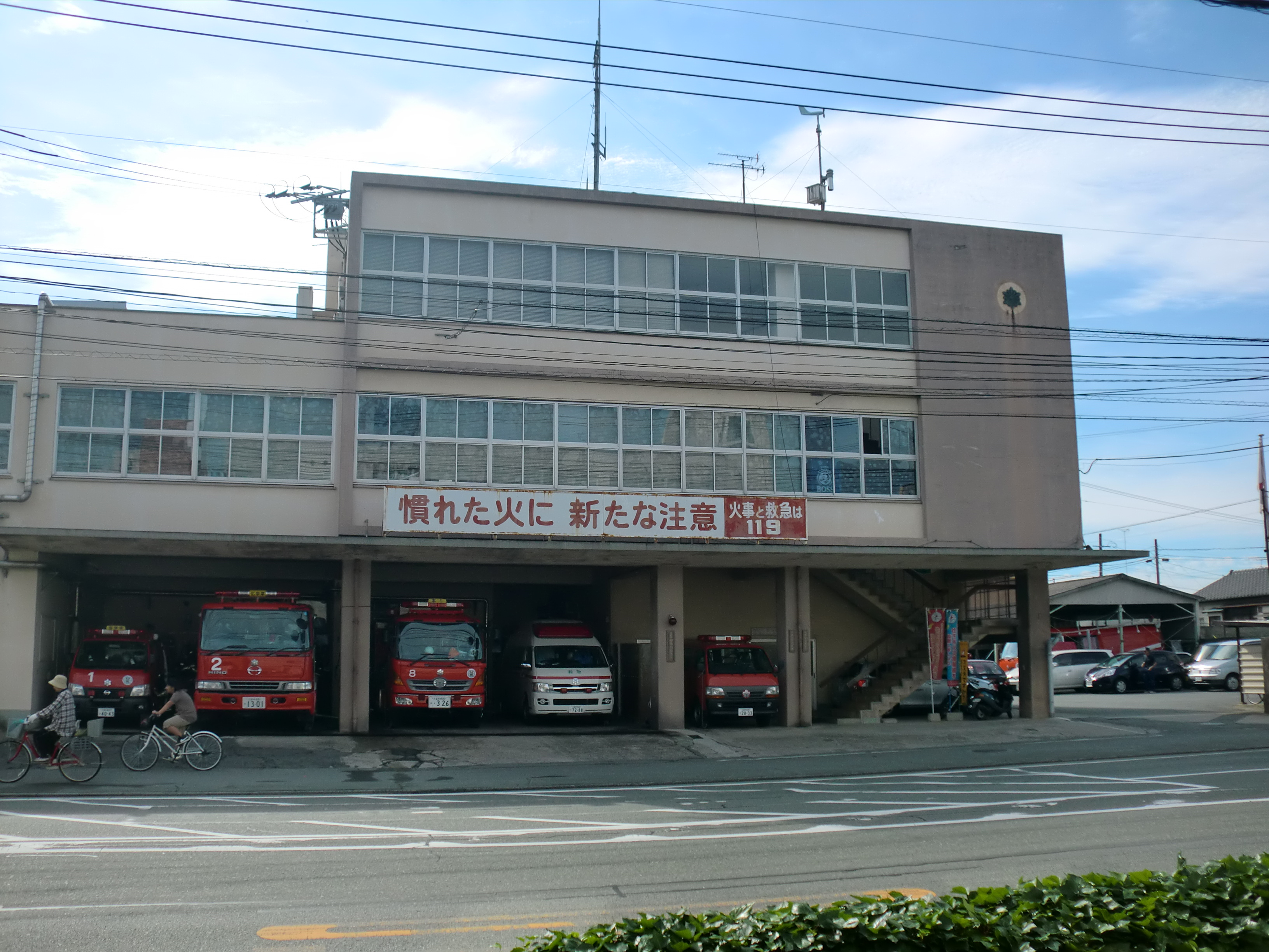 福岡県大牟田（おおむた）市にある大牟田市消防本部